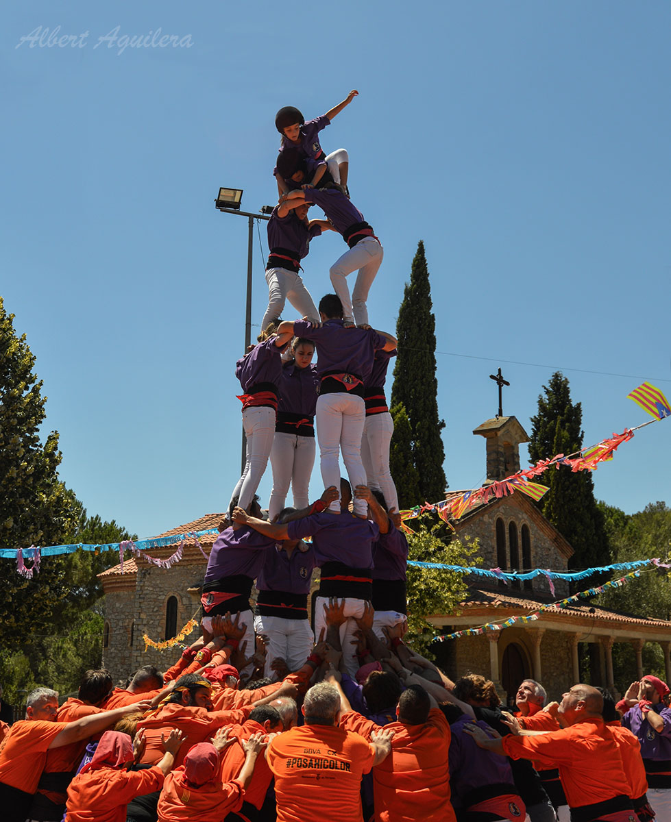 Castell 4d6 dels Manyacs de Parets